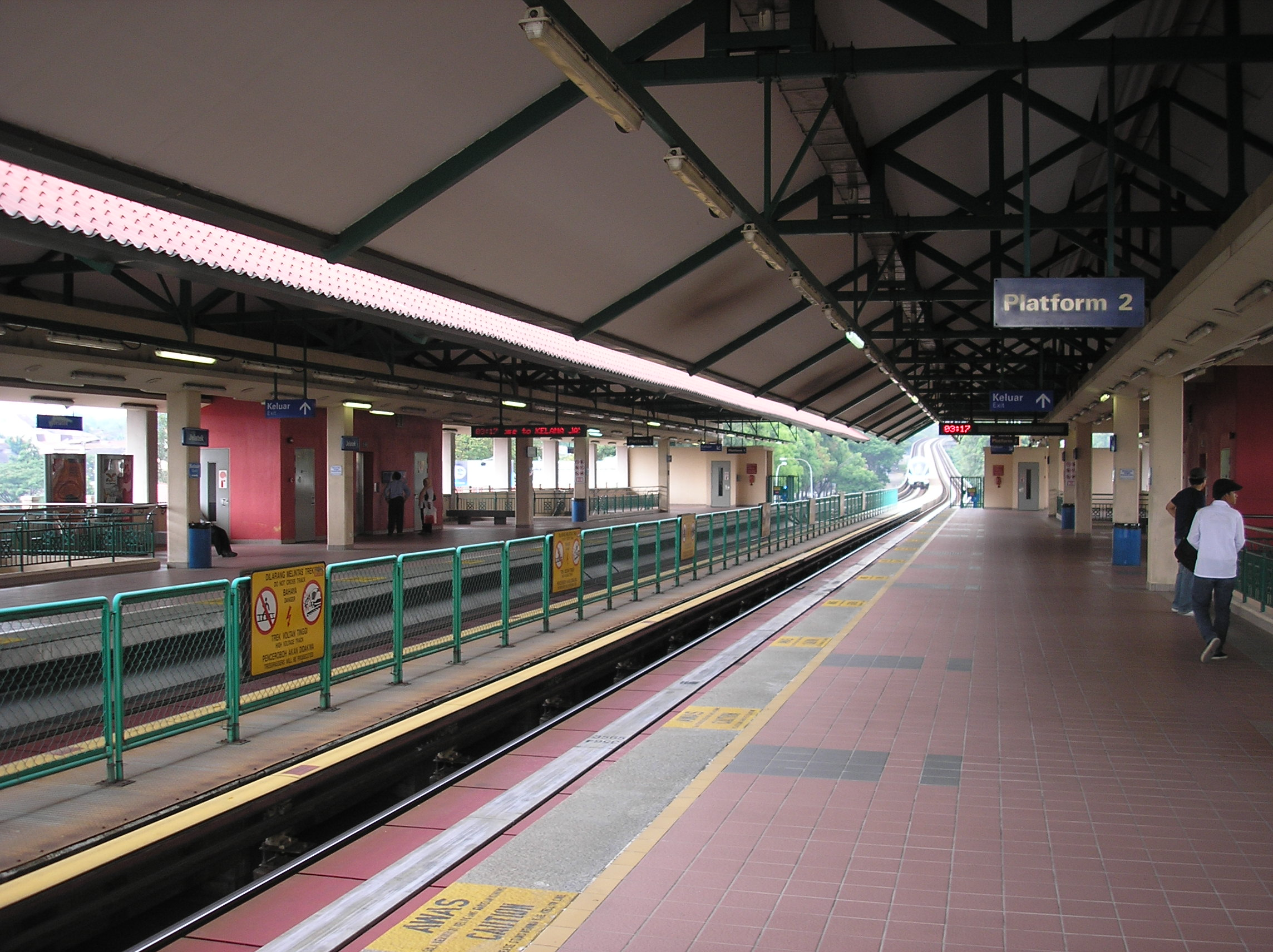 The Jelatek LRT station (Kelana Jaya Line), Kuala Lumpur, Malaysia.